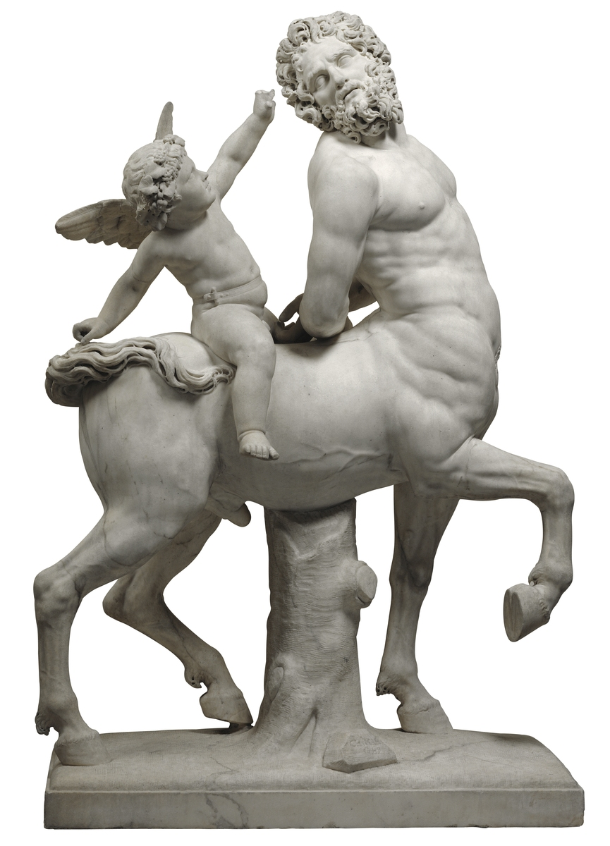 Groupe en marbre d'après l'antique